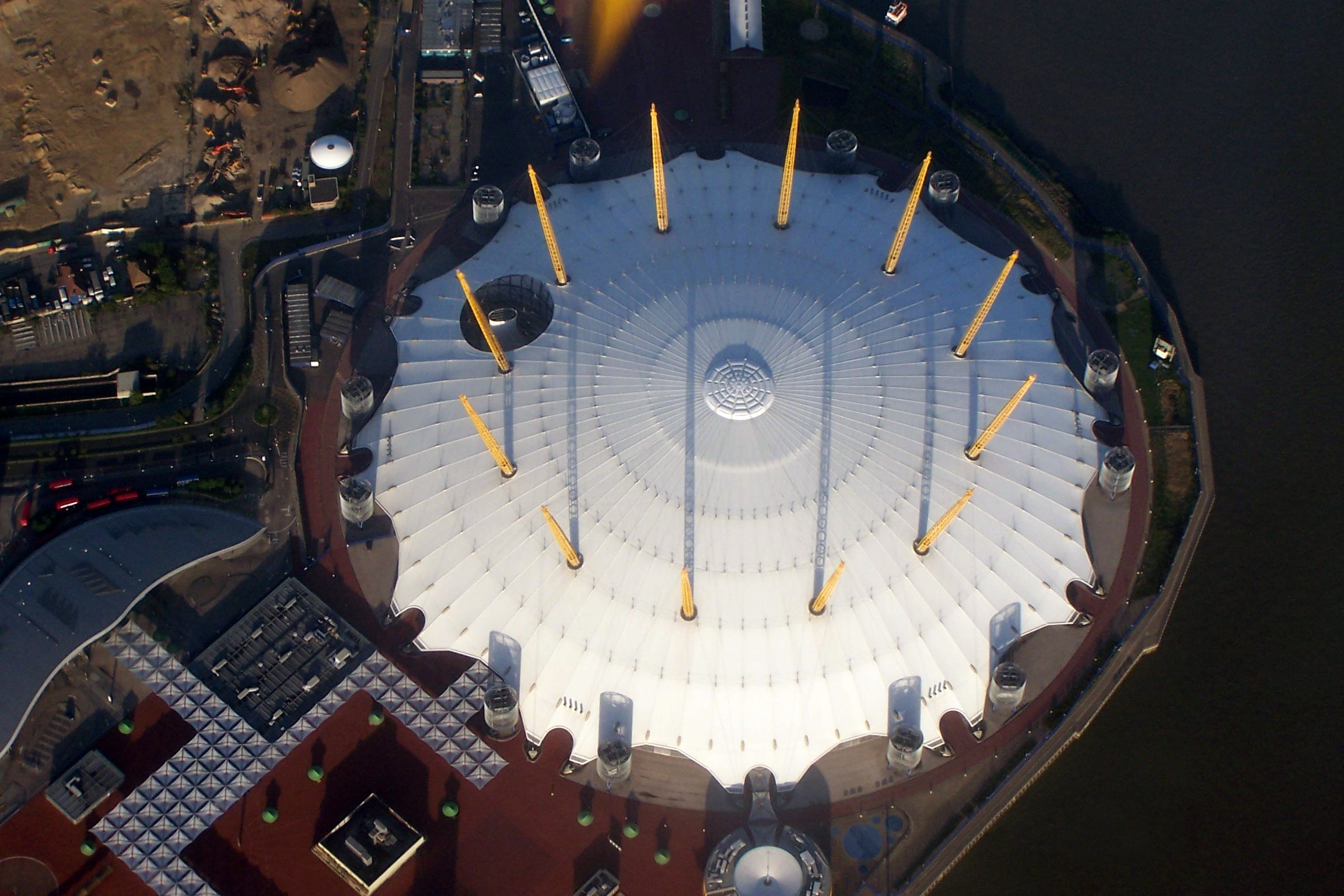 Millenium Dome, London